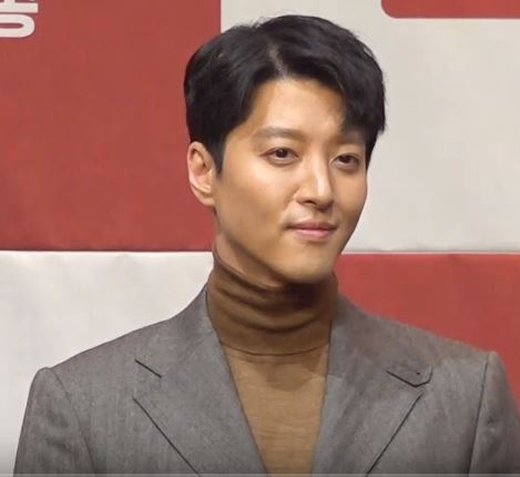 TV조선 특별기획 드라마 '레버리지: 사기조작단' 제작발표회가 10일 오후 서울 구로구 신도림 라마다호텔 열렸다.